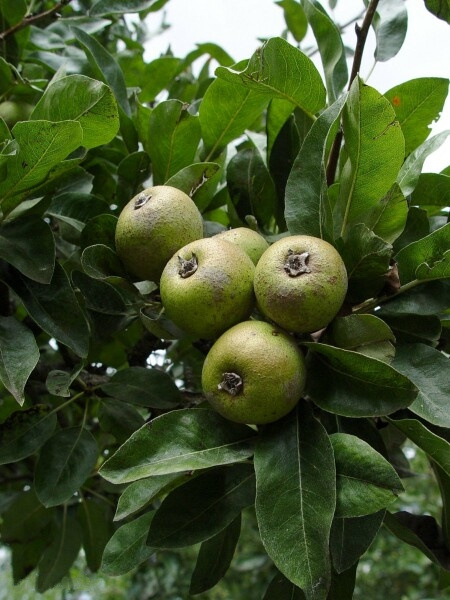 Pyrus nivalis